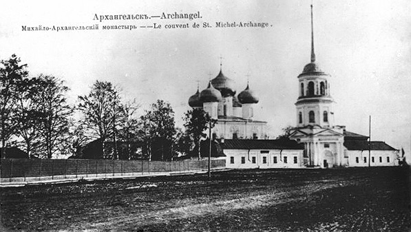 Михаило-Архангельский монастырь, Архангельск, начало 20 века